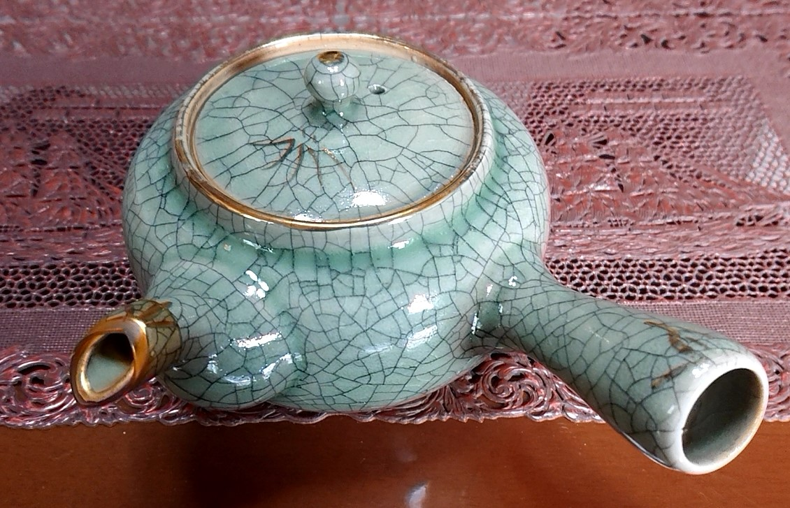 福島県相馬地方特産の陶磁器